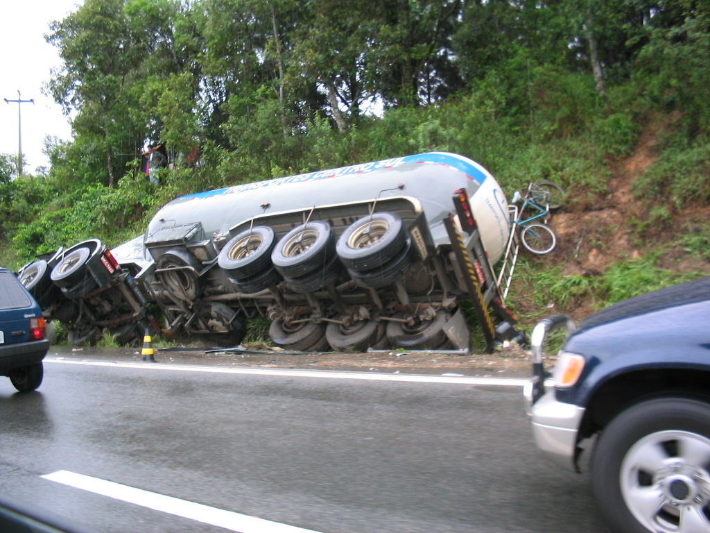 Acidente numa estrada em direção à Florianópolis-SC.